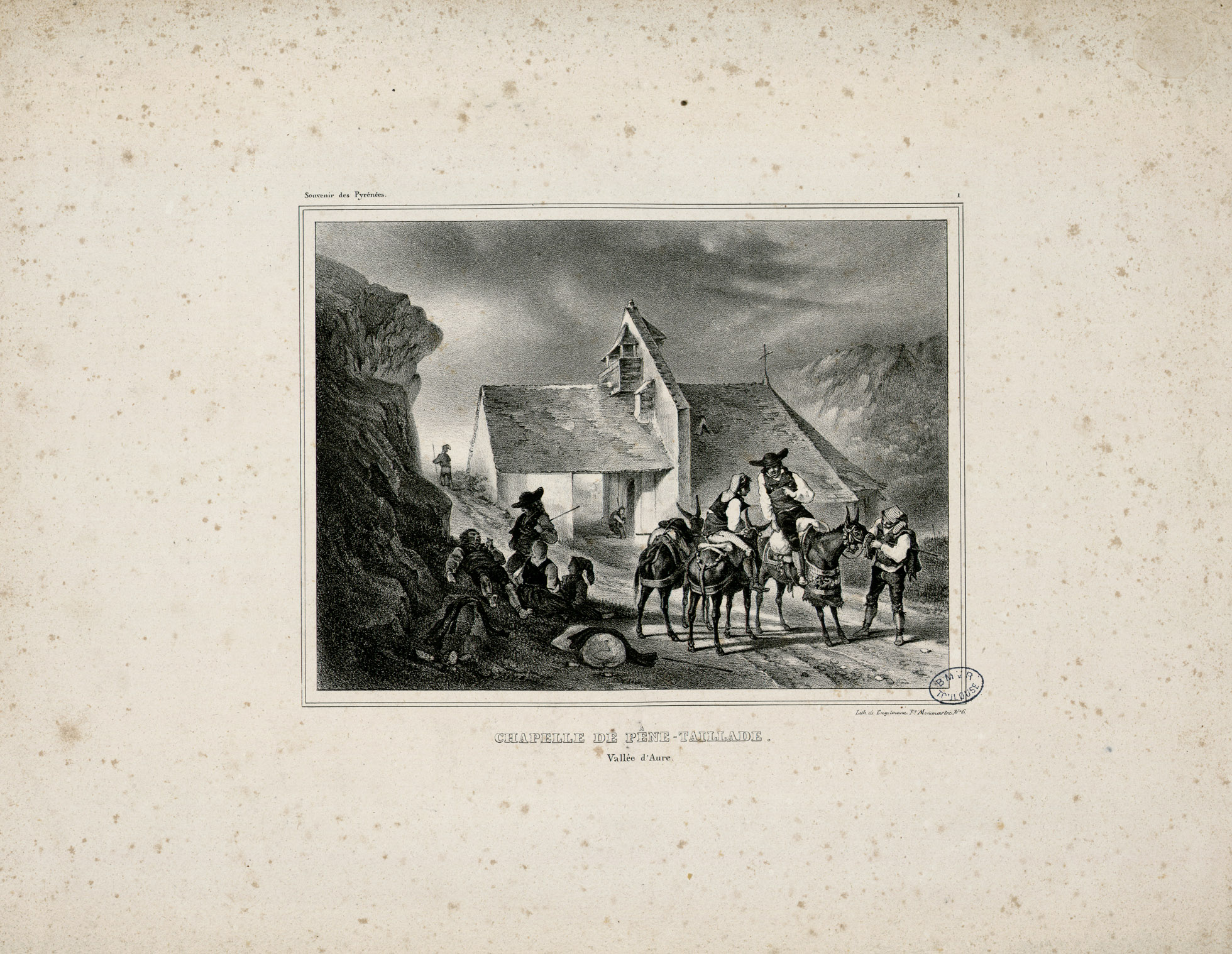 Fait partie d'un recueil de 14 pl. en n. et b. et 2 pl. en couleurs de formats divers. Oeuvres diverses sur les Pyrénées extraites de "Souvenirs des Pyrénées" (suite de 6 lithographies), de "Souvenirs d'artistes" (2 pièces sur les Pyrénées), de "Album de l'Infini" (1 pièce), de "Musiciens comiques ou pittoresques " (revue et gazette musicale) (1 pièce), de "l'Artiste" (1 pièce), de "Travestissemens (sic) grotesques" (1 pièce), de "Nouveaux travestissemens" (sic) (2 pièces) + 2 pièces séparées (pl. 13 et 14). Pl. 1 à 6 lith. par Engelmann (Paris). Pl. 7 et 8 dessinées par Cirpenne et Gavarni ; publiées à Londres par Ch. Tilt et à New York par Ward Bailly et Cie ; et lithographiées par Benard et Bichebois. Pl. 9 dessinée par Gavarni ; éditée par Bourmancé (Paris), lithographiée par Roger. Pl. 10 dessinve par Gavarni ; éditée aux Bureaux 97 Paris) ; imprimée par Thierry Frères (Paris). Pl. 11 dessinée par Gavarni ; lith. par Frey. Pl. 12 dessinée par Gavarni ; imprimée par Frey et datée de 1835. Pl. 13 : aucune indication supplémentaire. Pl. 14 publiée à Londres par Mc Lean en 1829 et à Paris par Giraldon-Bovinet ; lith. par Bernard et Delarue. Pl. 15 et 16 signée Gavarni ; imprimée chez Lemercier, Benard et Cie. Pièces jointes : notice explicative ms sur Les souvenirs d'artiste et sur Grotesques déguisés ; notice explicative ms sur Souvenirs des Pyrénées ; récapitulatif ms des pl. contenues dans Oeuvres diverses sur les Pyrénées par Gavarni. Ancely, René (1876 - 1966). Possesseur